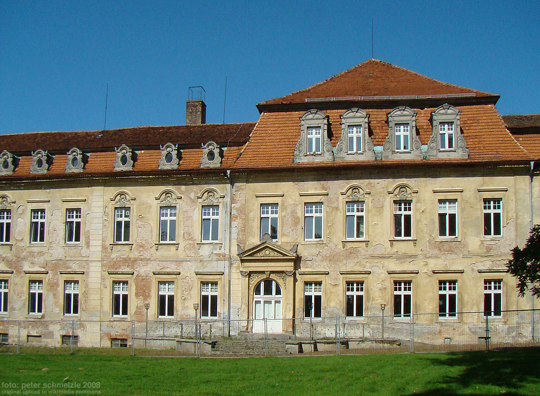 Südflügel von Schloss Ivenack